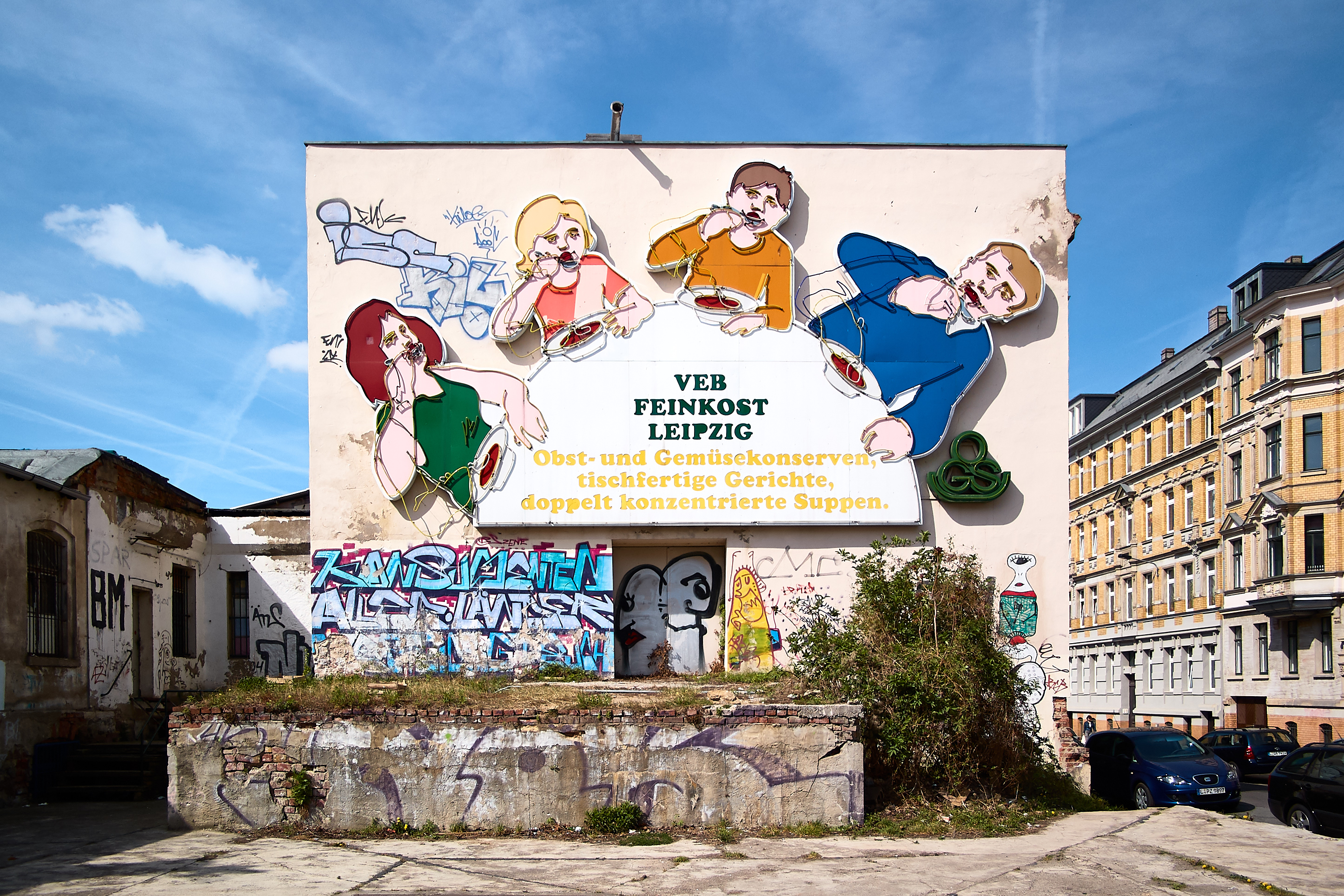 Die Löffelfamielie am Feinkostgelände in der Karl-Liebknecht-Straße in Leipzig